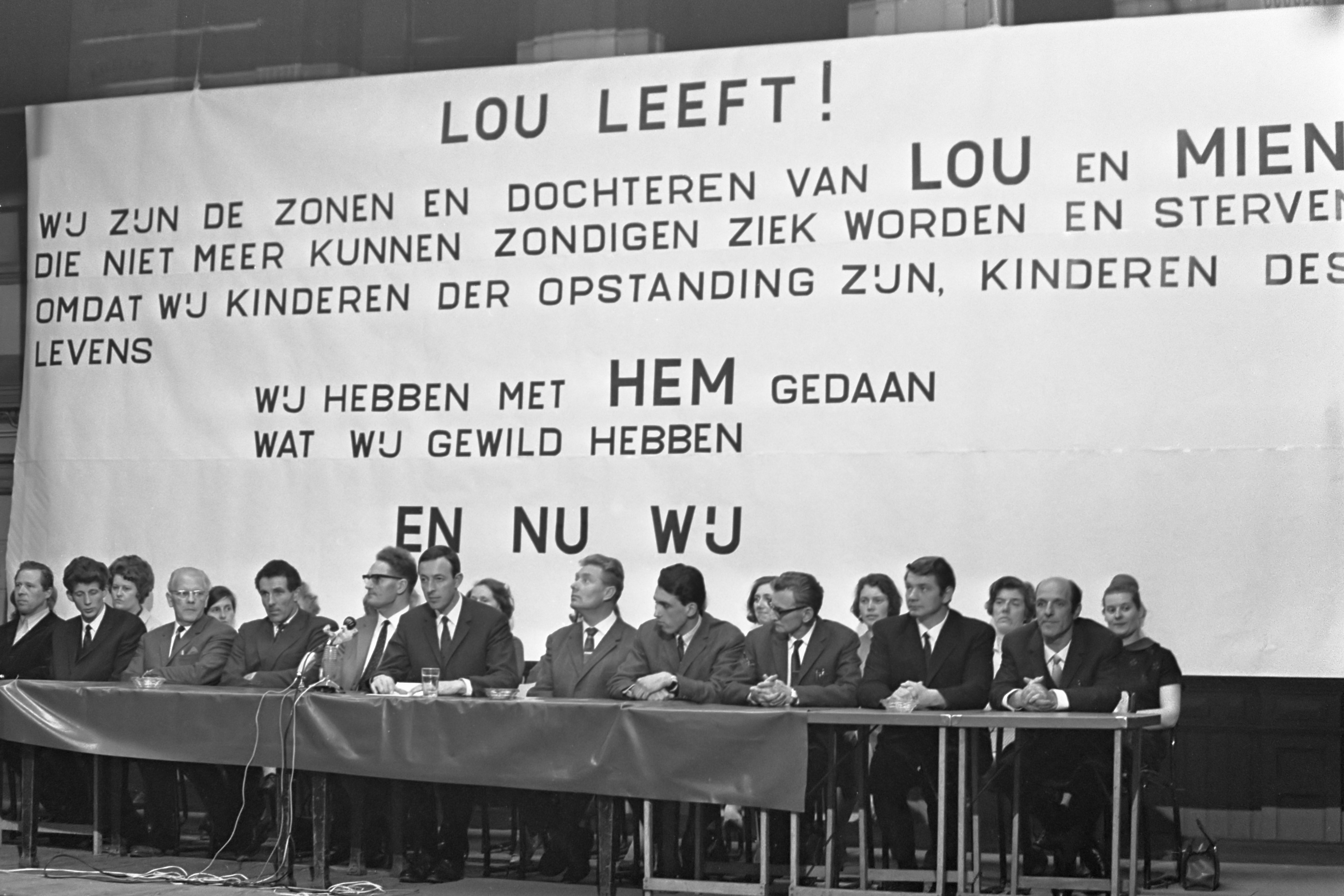 Lou-groep bijeen in Frascati Amsterdam. De zonen en dochters van Lou op podium 2 april 1968